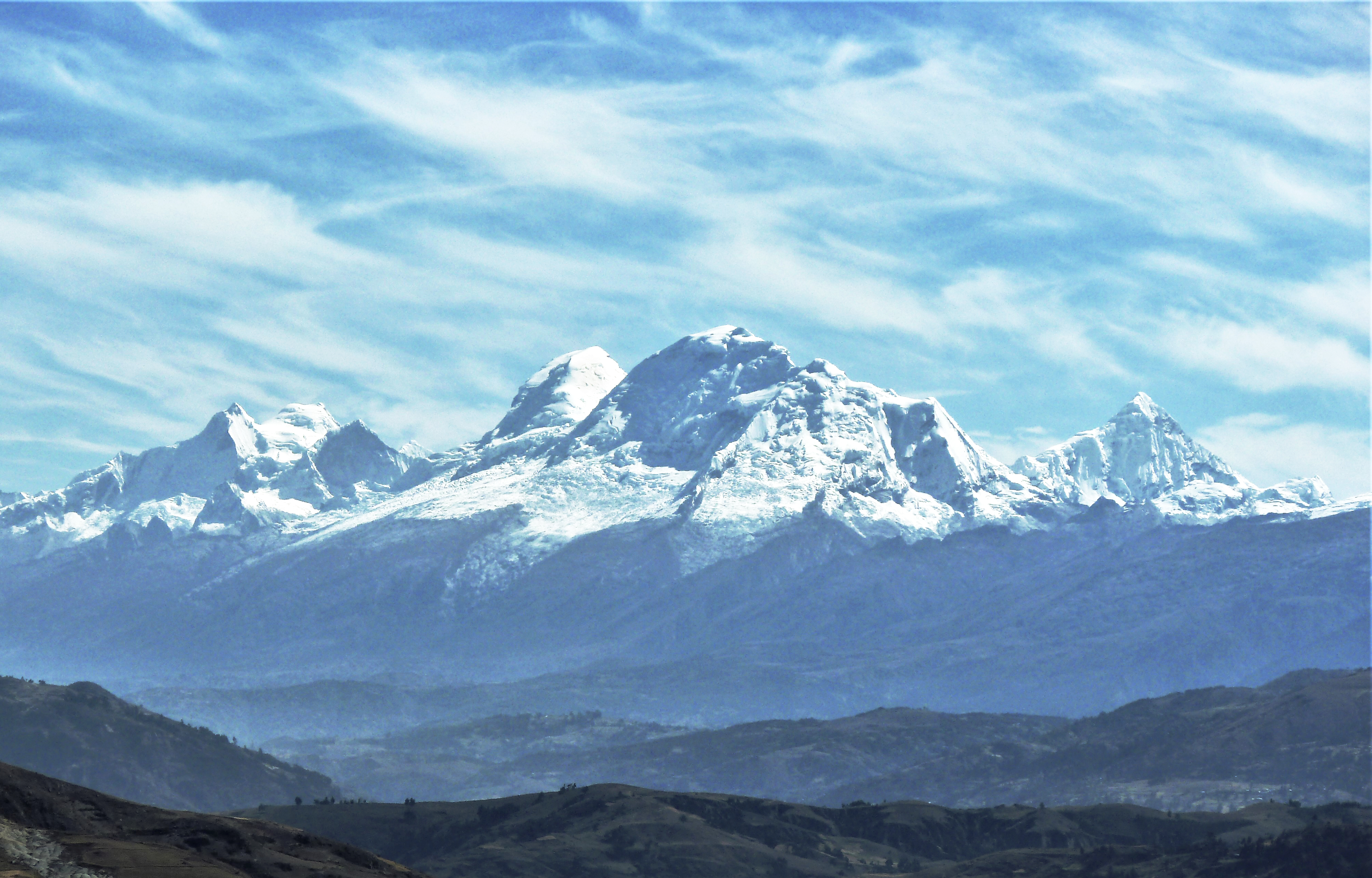 Nevado Huascarán south face seen from the Cordillera Negra